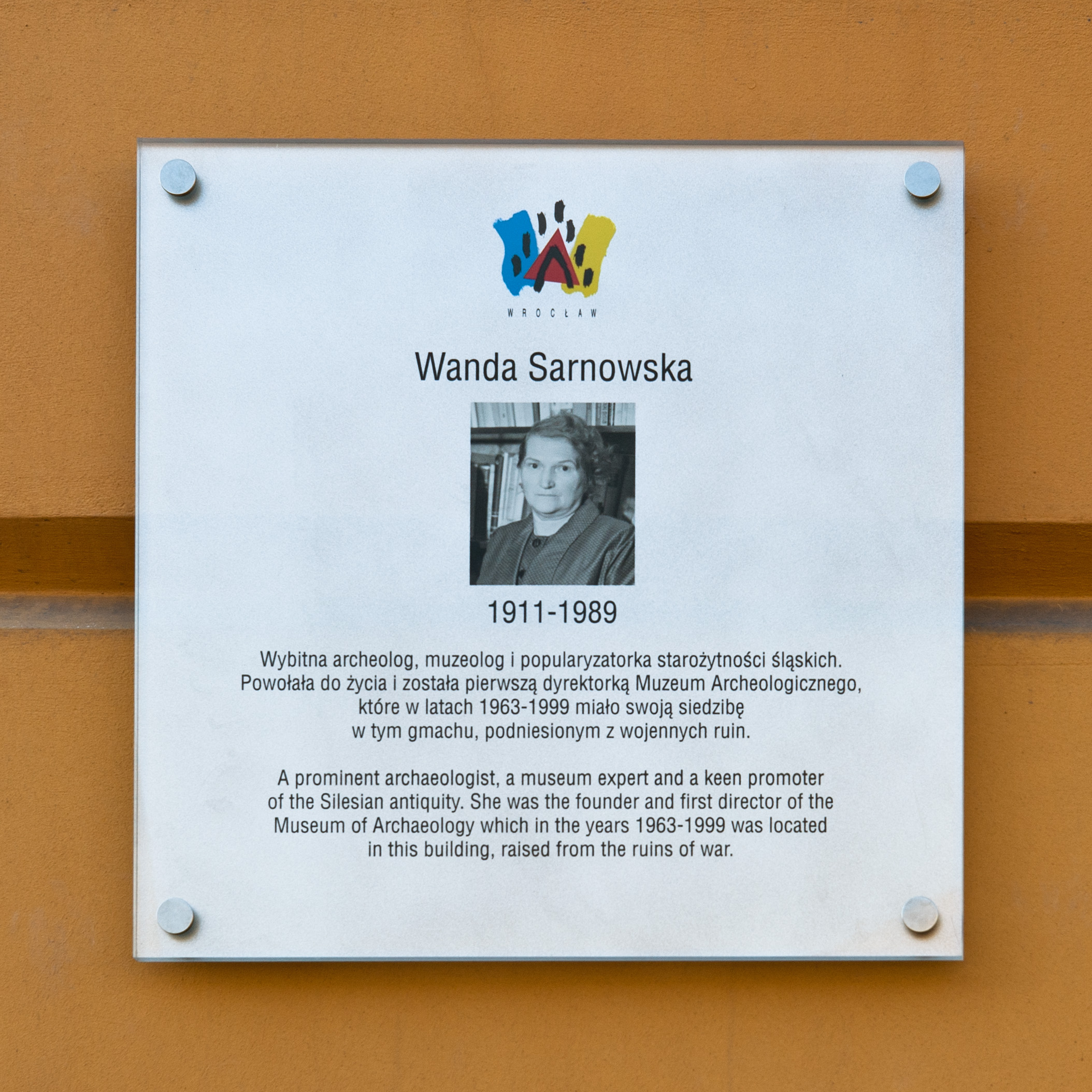 Tablica poświęcona doc. Wandzie Sarnowskiej na fasadzie Pałacu Królewskiego we Wrocławiu, ul. Kazimierza Wielkiego 35. Autorem portretu na tablicy jest Leszek Sudnik.